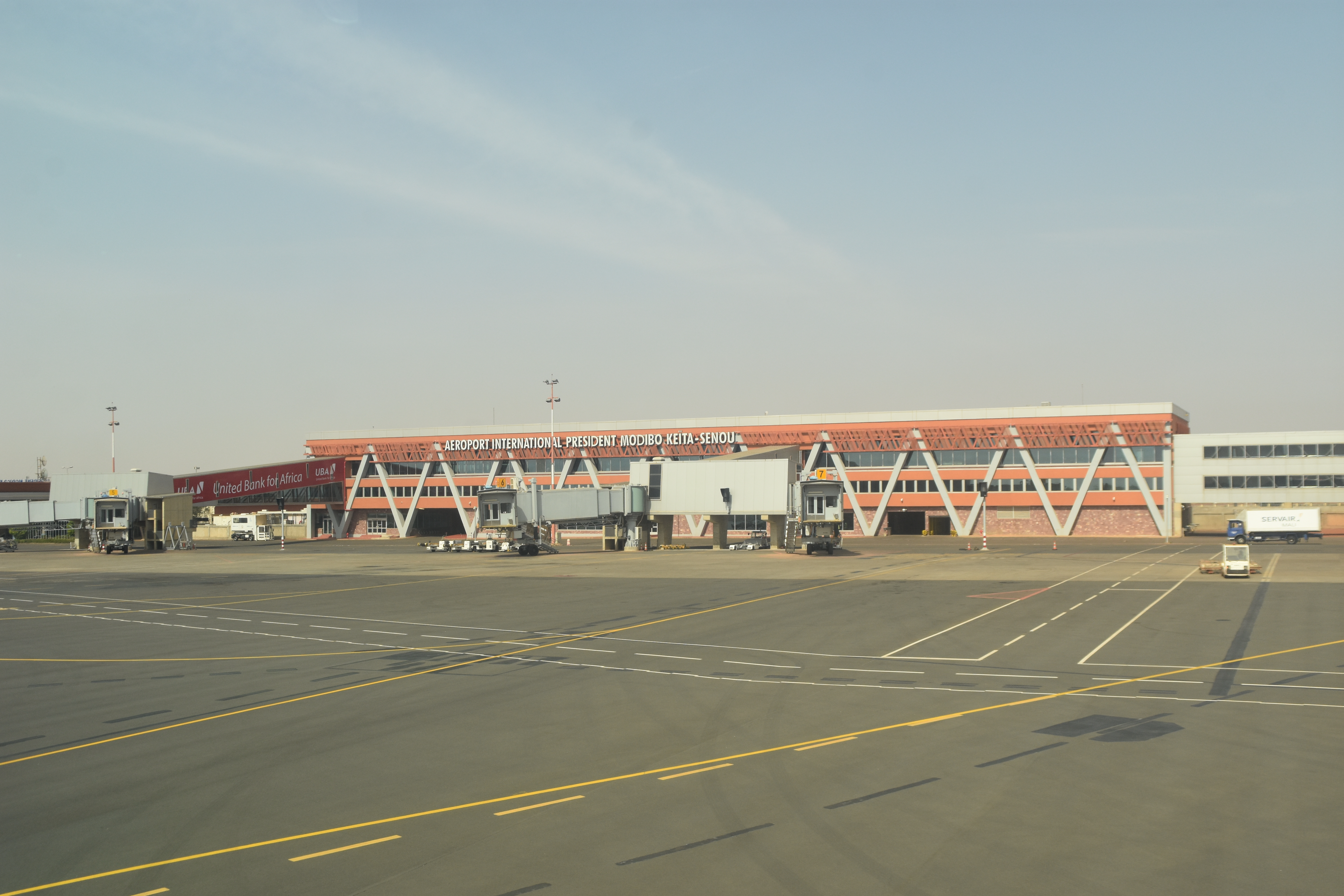 Blick auf das Terminalgebäude